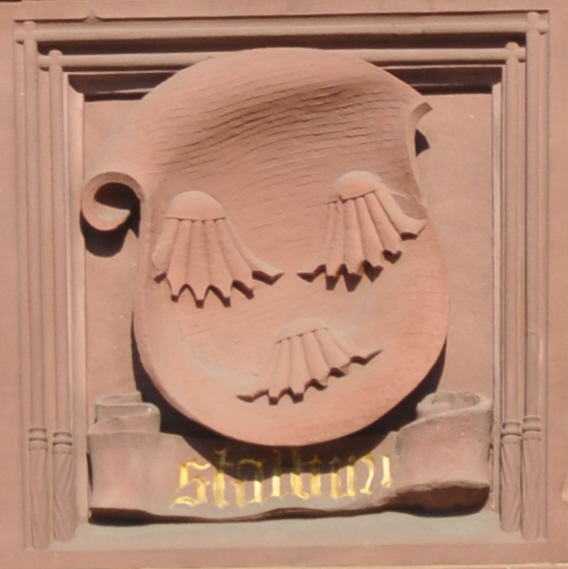 Frankfurt am Main, Rathaus (Römer), Haus Löwenstein, Fassadendetail, Wappenrelief (1896/1897), Wappen Stalburg